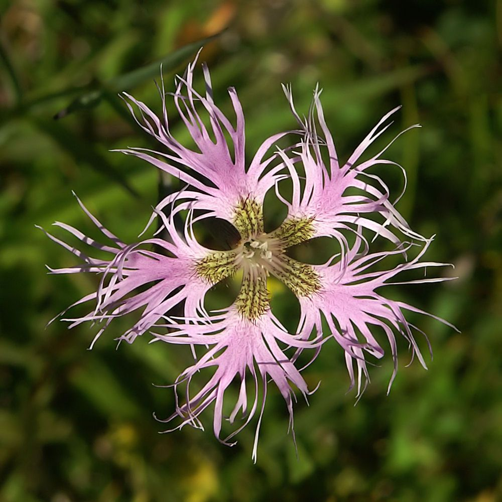 Dianthus superbus